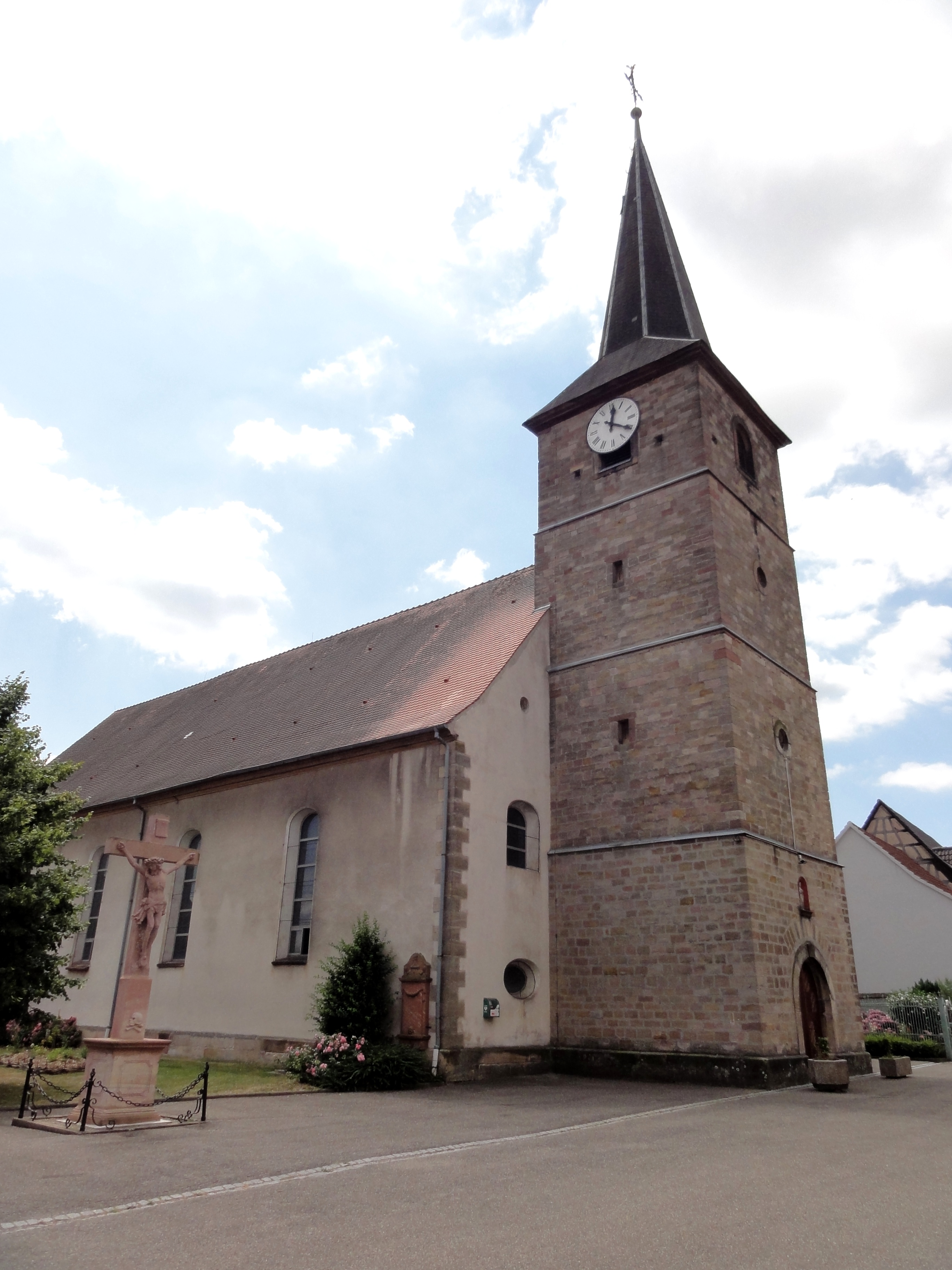 Alsace, Bas-Rhin, Riedseltz, Église Saint-Jacques (XVIIIe-XIXe)